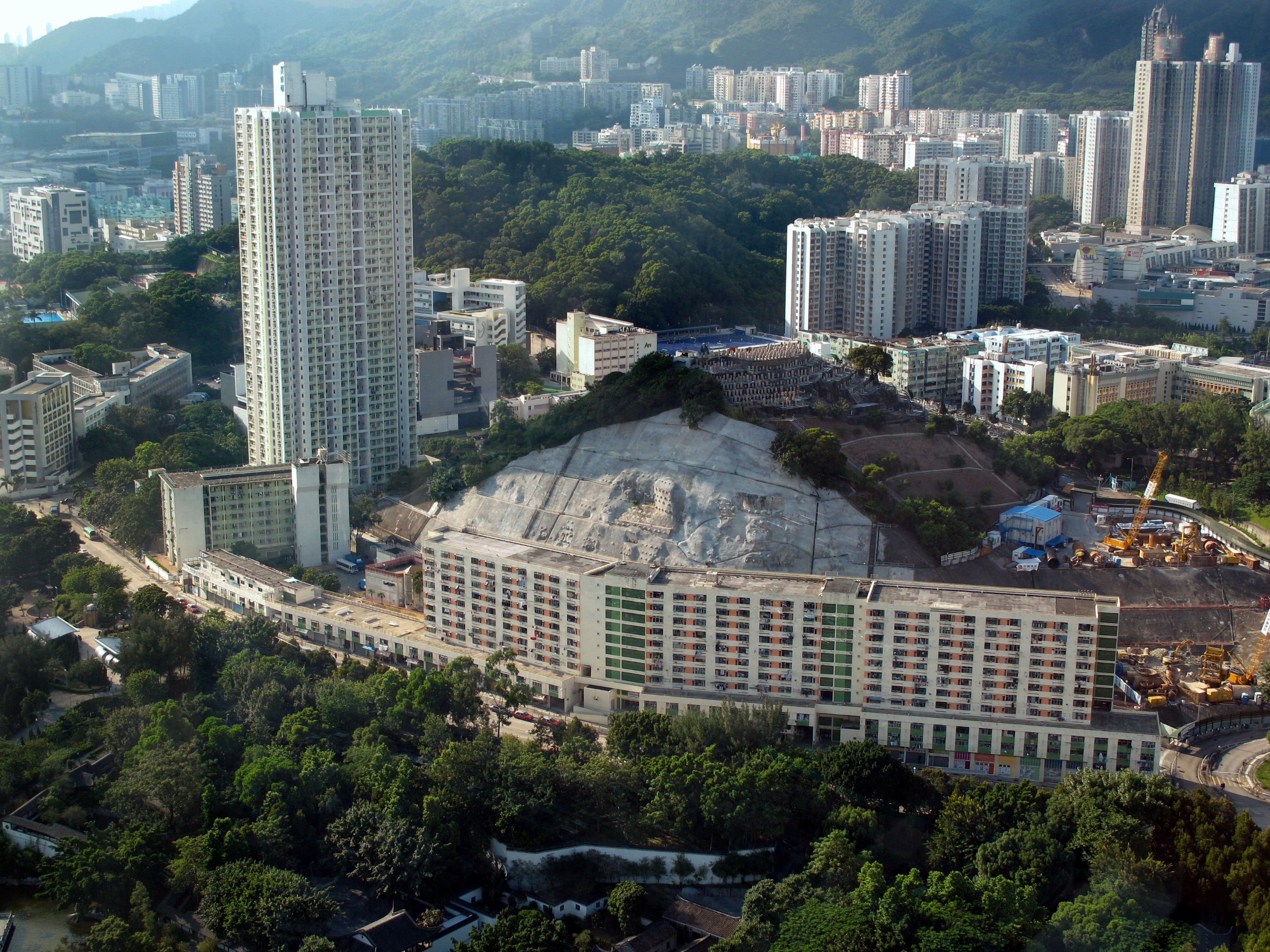 Mei Tung Estate 美東邨